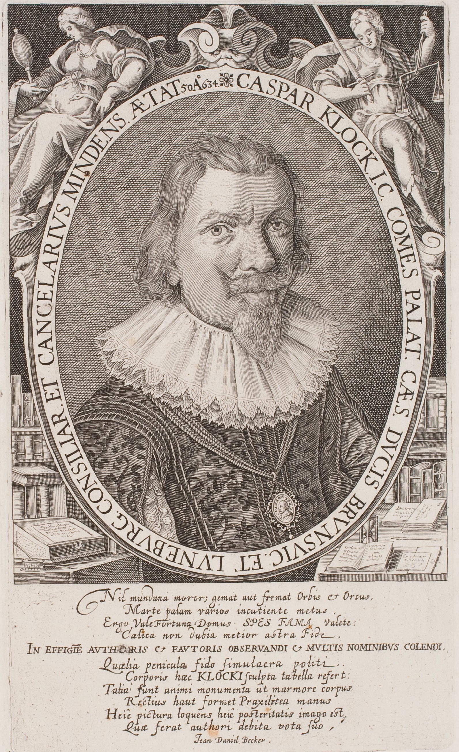 Kupferstich des Juristen und Staatsmannes Kaspar Klock (1583–1655). Die Inschrift unter dem Bild lautet: Nil mundana moror: gemat aut fremat Orbis et Orcus, Marte palam varios incutiente metus. Ergo Vale Fortuna Domus, SPES FAMA Valete: Caelica non dubia metior astra Fide. Nicht halte ich mich mit Weltlichem auf, mögen Erde und Hölle auch seufzen und stöhnen, wenn Mars ganz offen einen Schrecken nach dem andern verbreitet. Also lebt wohl, Vermögen und Haus, HOFFNUNG und RUHM, die Sterne am Himmel messe ich mit meinem nie wankenden Glauben. Darunter: Qualia peniculo fido simulacra politi Corporis haec KLOCKI sculpta tabella refert: Talia sunt animi monumenta ut marmore corpus Rectius haut formet Praxilitea [recte: Praxitelea] manus. Heîc pictura loquens heîc posteritatis imago est, Quae ferat authori debita vota suo. So wie das Bild von Klocks ansehnlicher Gestalt, das dieses mit getreuem Griffel gestochene Blatt gibt, so sind auch die Werke seines Geistes, so daß auch Praxiteles’ Hand nicht richtiger seinen Leib in Marmor bilden könnte. Hier ist ein sprechendes Bild, hier ein Bild der Nachwelt, das seinem Urheber die geschuldeten Wünsche bringe.